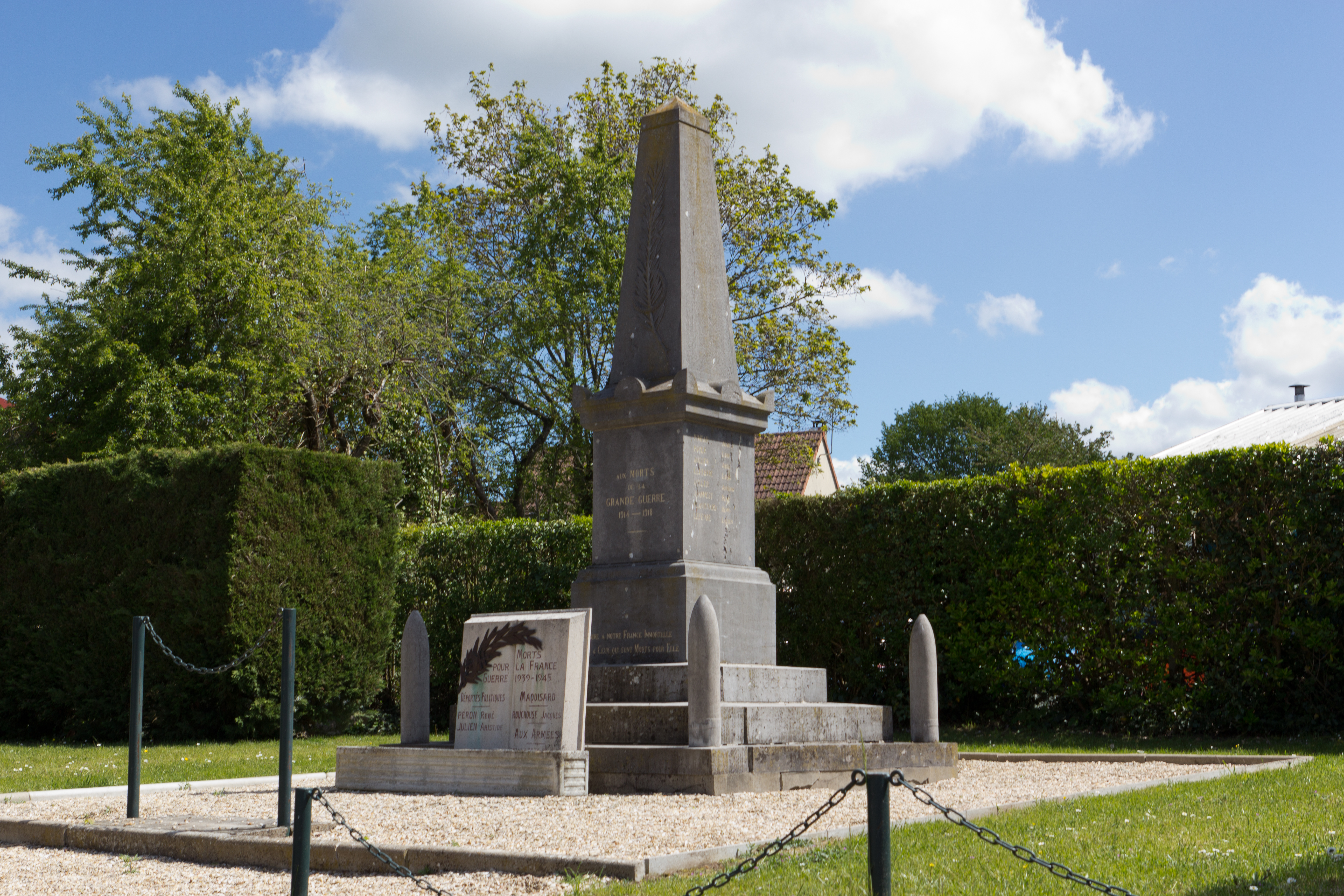 Monument aux mort de D'Huison-Longueville (quartier de Longueville), département de l'Essonne, France.